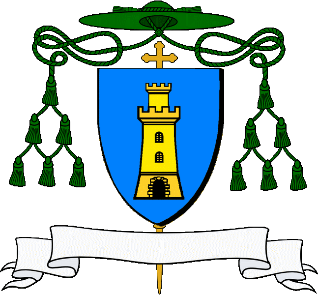 En glazur e dour tourigellet en aour